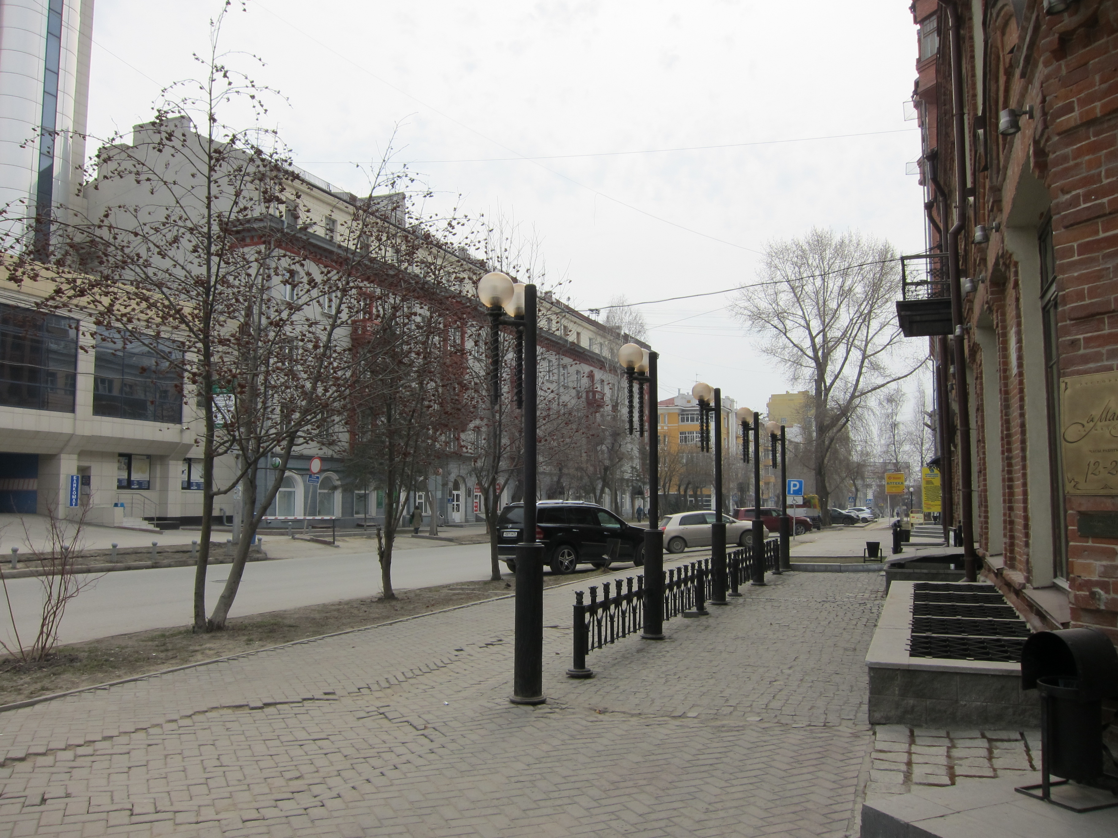 Советская улица в Новосибирске у пересечения с улицей Максима Горького